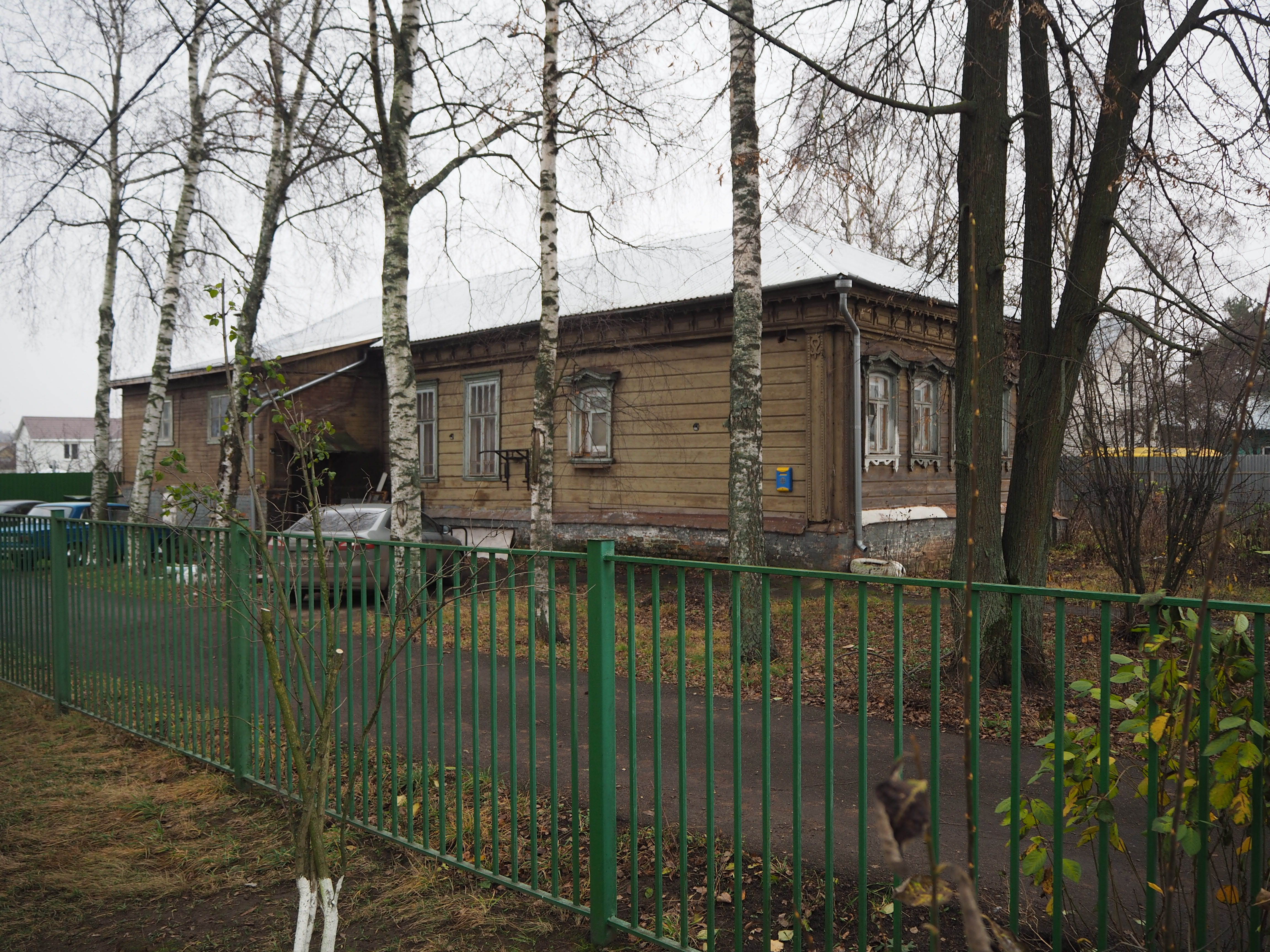 Жостово, ул. Центральная, д. 83. Здание церковно-приходской школы.